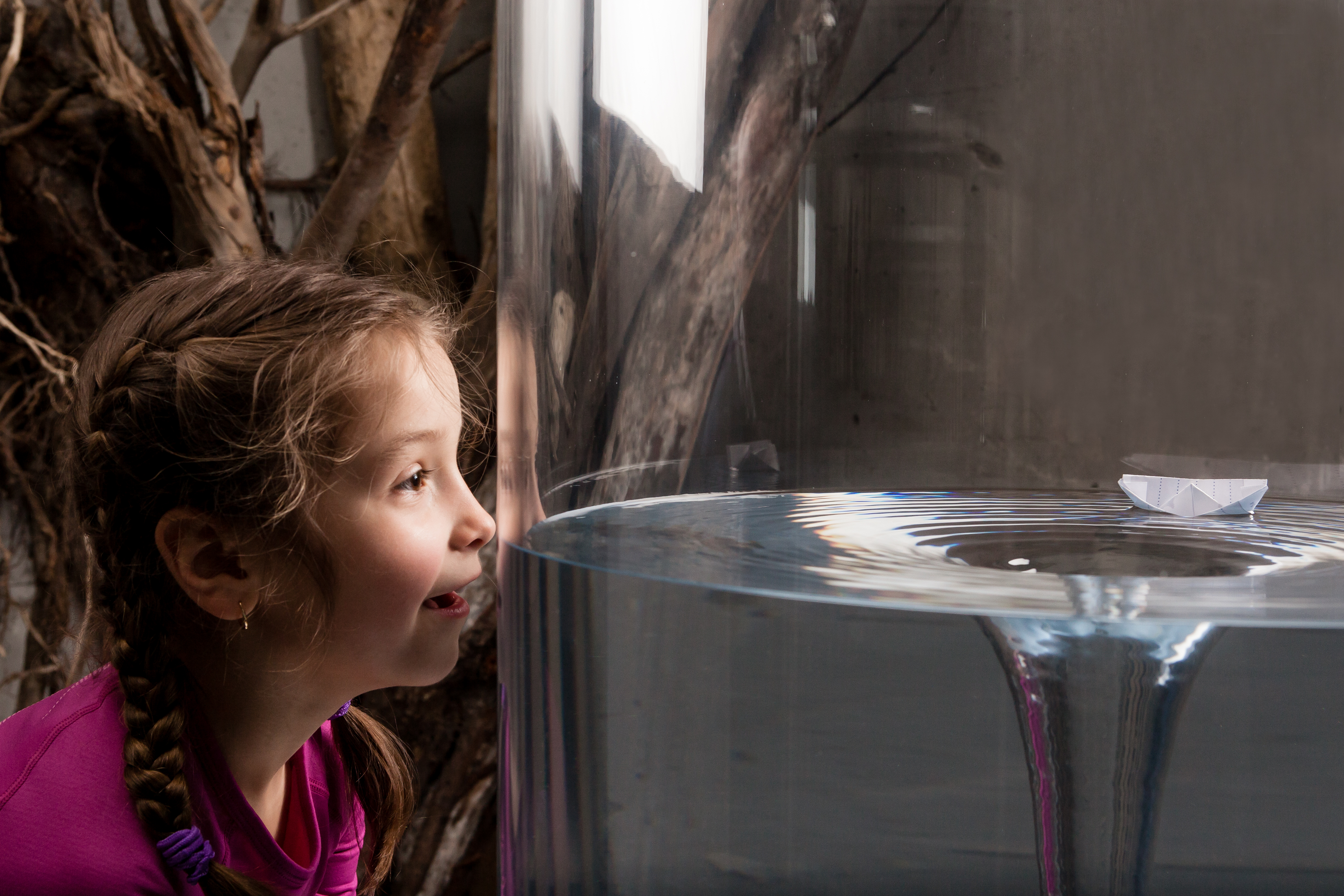 Strudel im Blauen Wunder